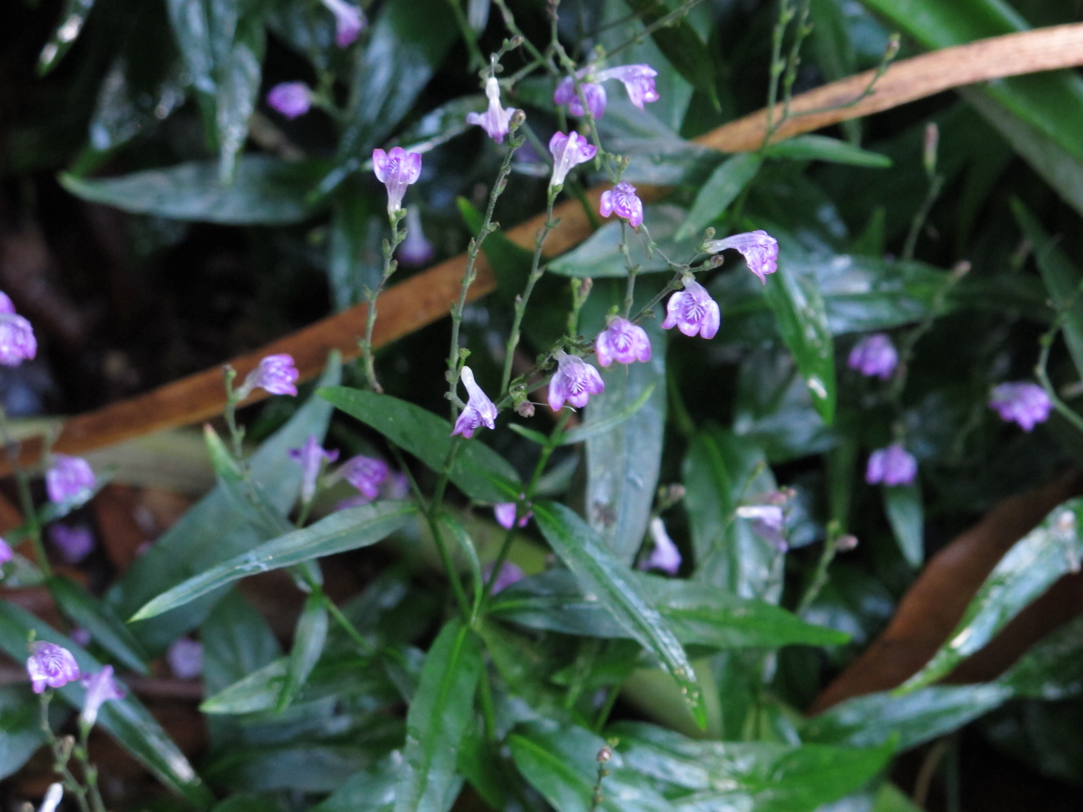 cultivated, private garden, Ft. Lauderdale, Florida, USA.